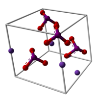 Estructura mol·lecular del Iodat de potassi